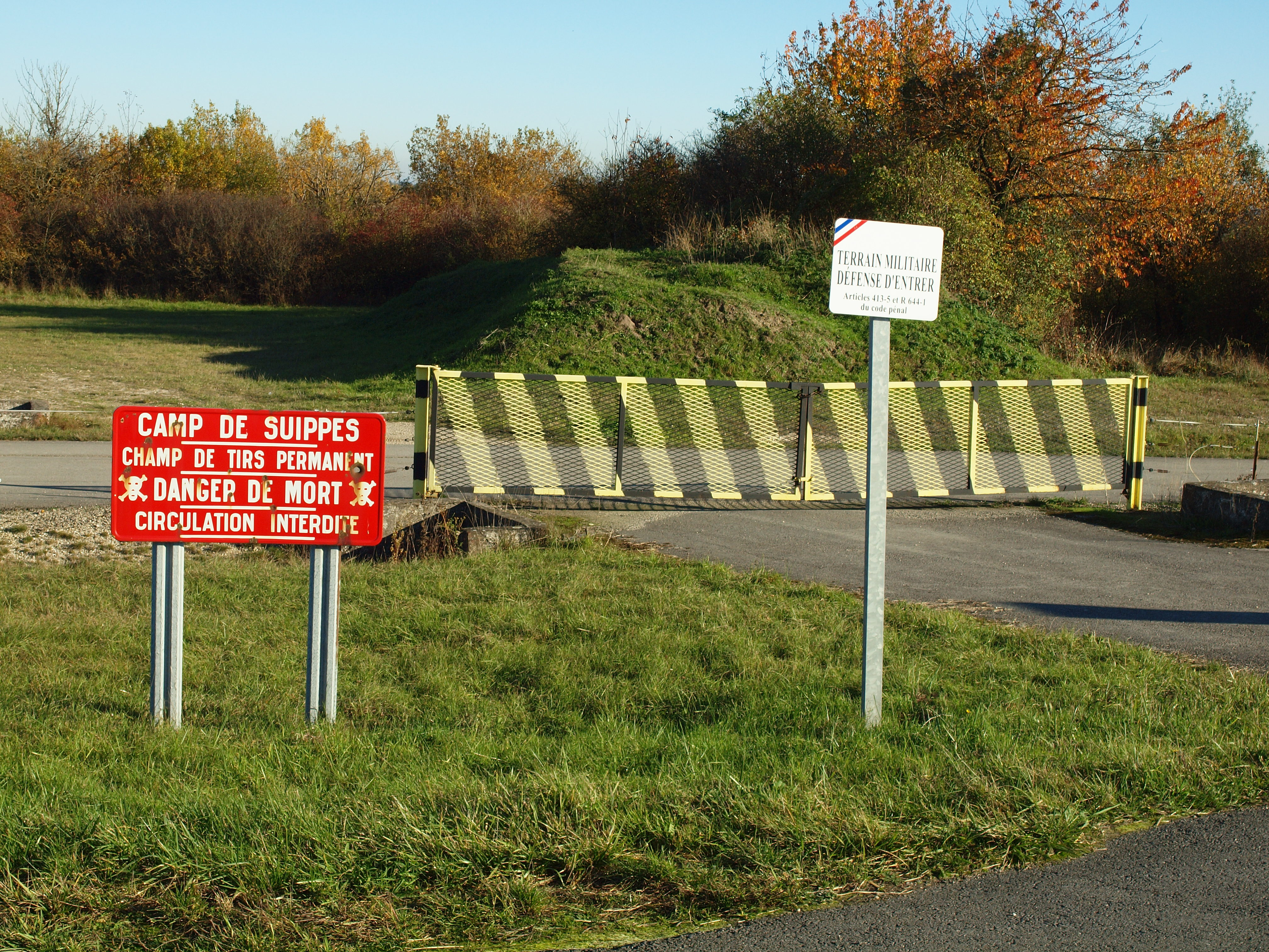 Face au monument aux morts des Armées de Champagne; une entrée du camp militaire de Suippes (Marne, France)